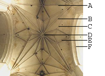 Stern(rippen)gewölbe mit A Gurtbogen, B Kreuzrippen, C Tierceron, D Schlussstein, E Lierne und F Wandbogen, Kościół św. Jana Chrzciciela i św. Jana Ewangelisty, Toruń, Polen.